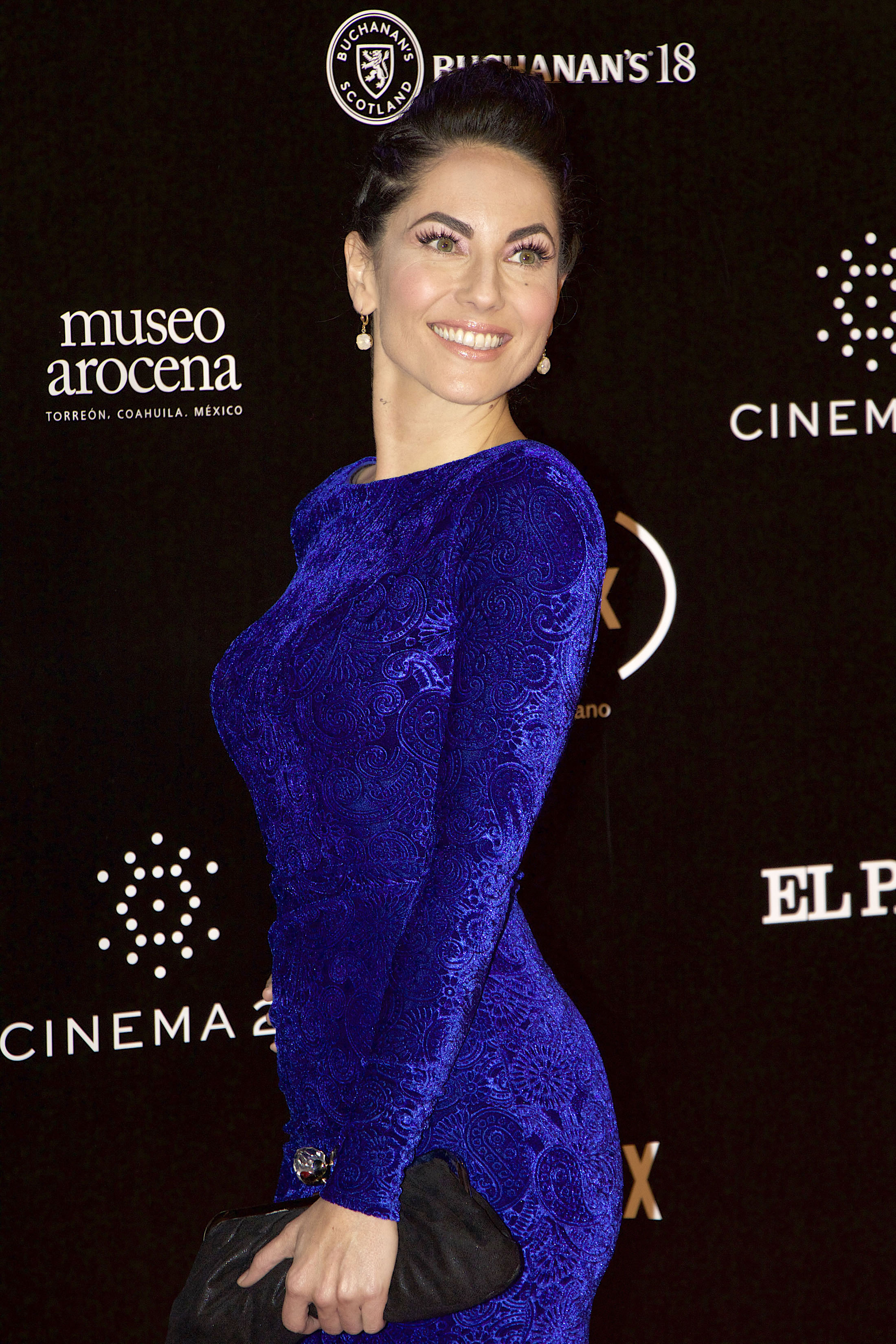 Miércoles 7 de noviembre de 2018Previo a la entrega de los Premios Fénix 2018, actores, actrices, elencos de las películas y series nominadas, pasaron por la alfombra roja, en la parte exterior del Teatro de la Ciudad Esperanza Iris.Fotografía: Milton Martínez / Secretaría de Cultura CDMX